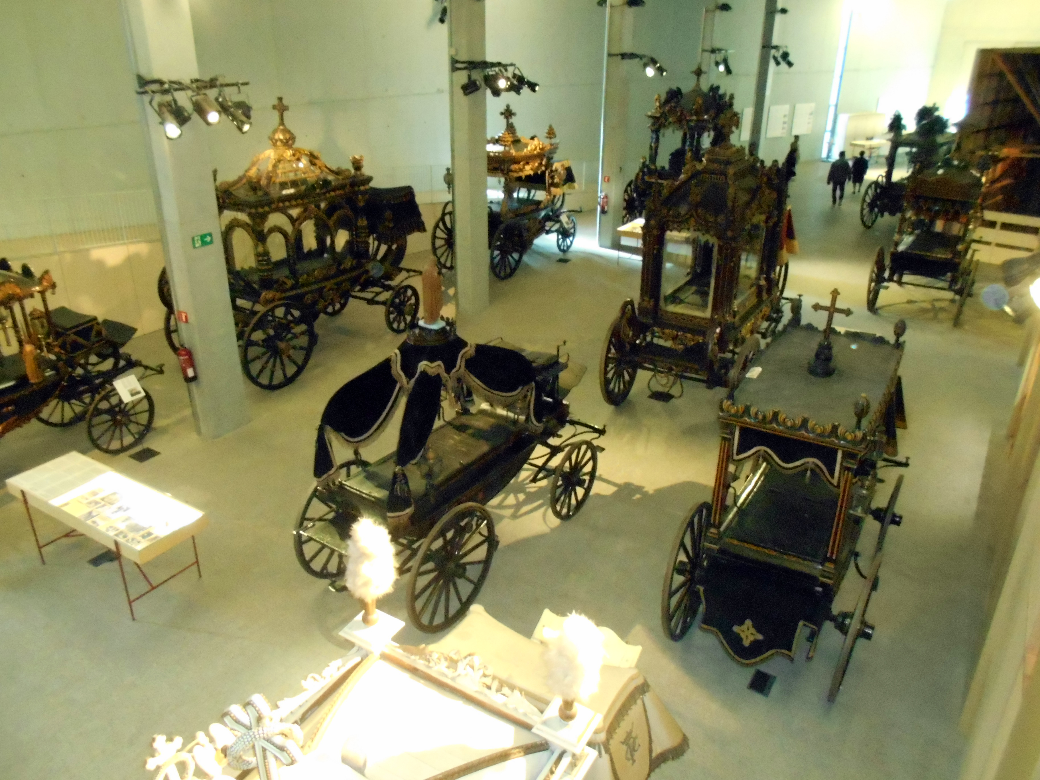 Museo de Carrozas Fúnebres del cementerio de Montjuïc.